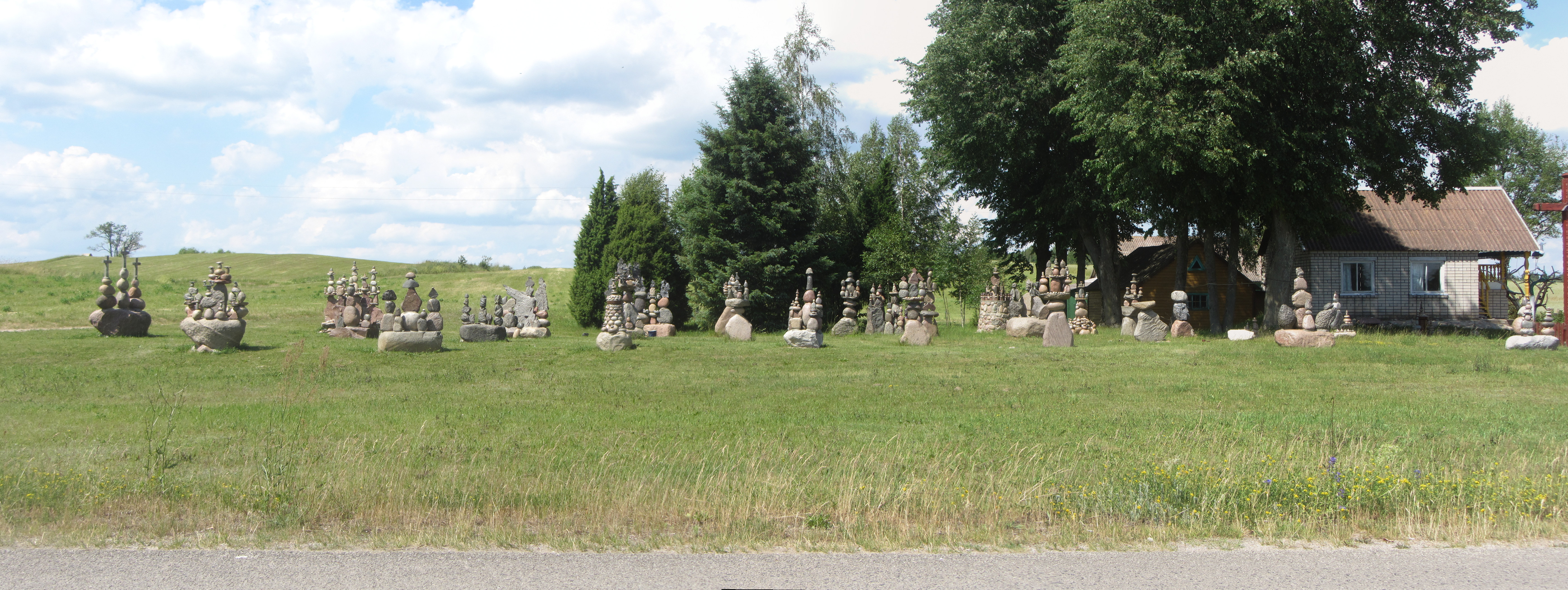 Eičiūnai, Lithuania